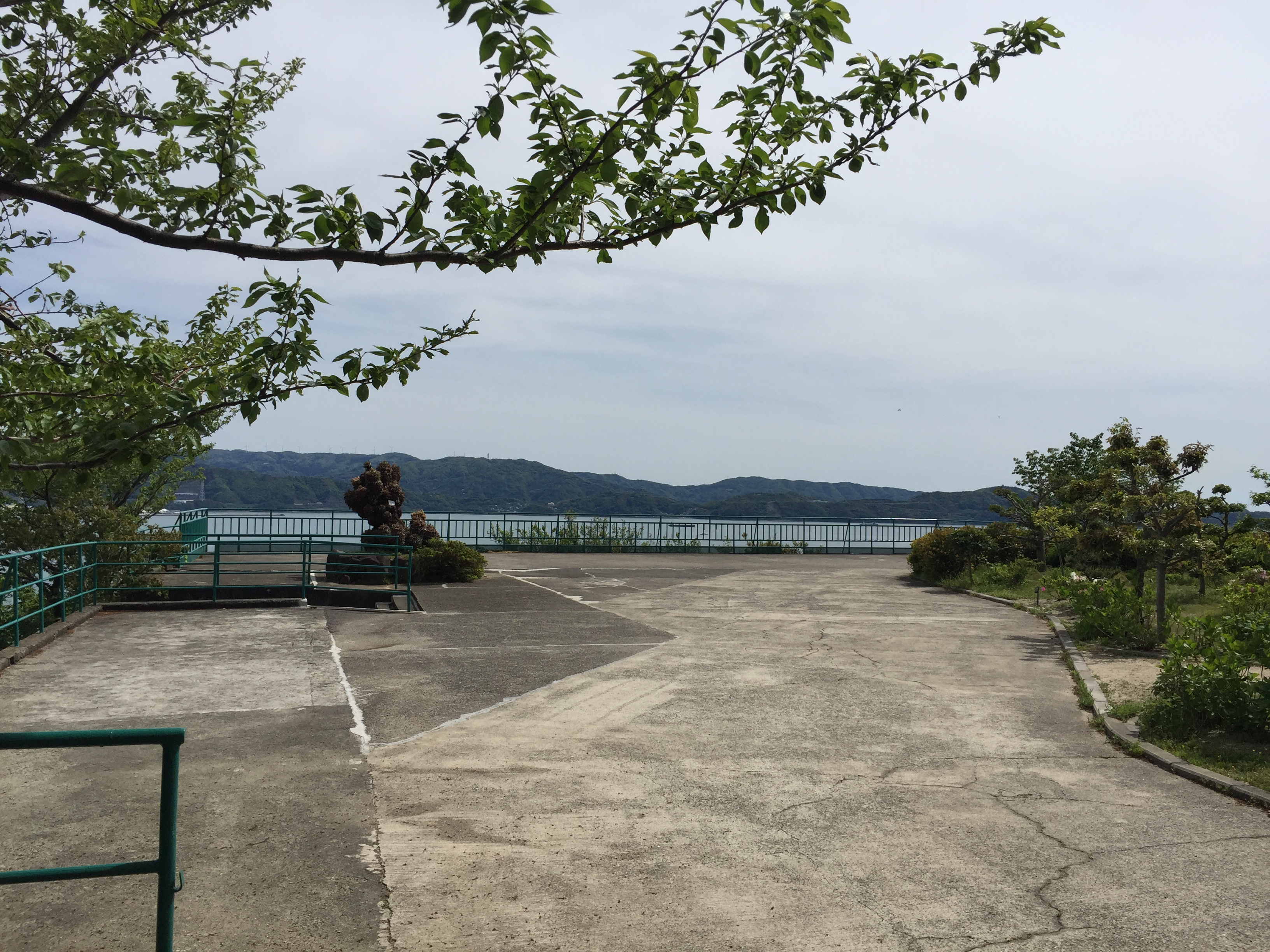 新和歌浦ロープウェイの新和歌浦駅跡。2016年4月22日撮影。The site of Shin-Wakaura Station, Shin-Wakaura Ropeway. Photo shooting date:2016.4.22